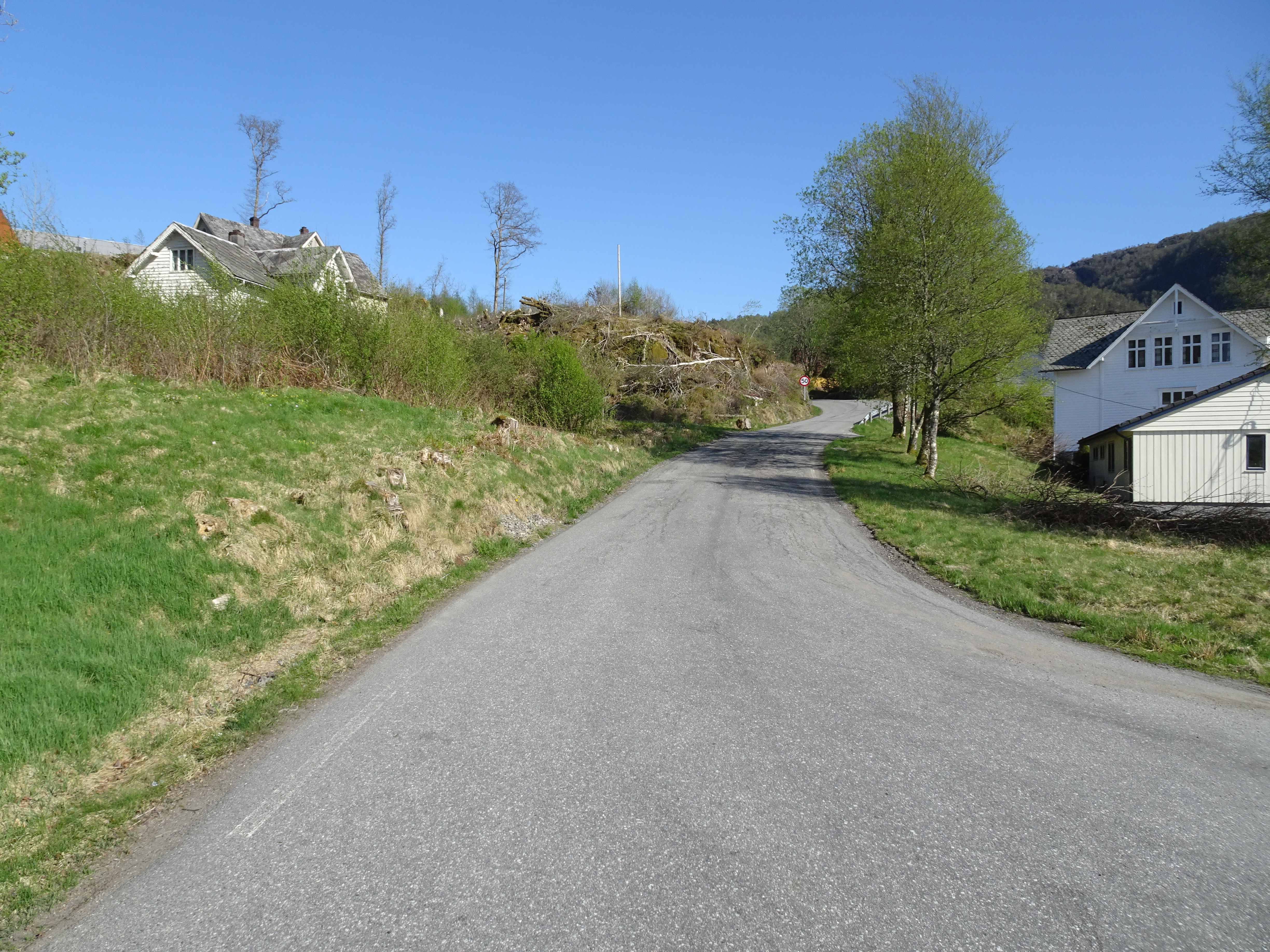 Uggdalsdalen, vestenden av fylkesvei 5078 (tidl. 79), i Uggdal